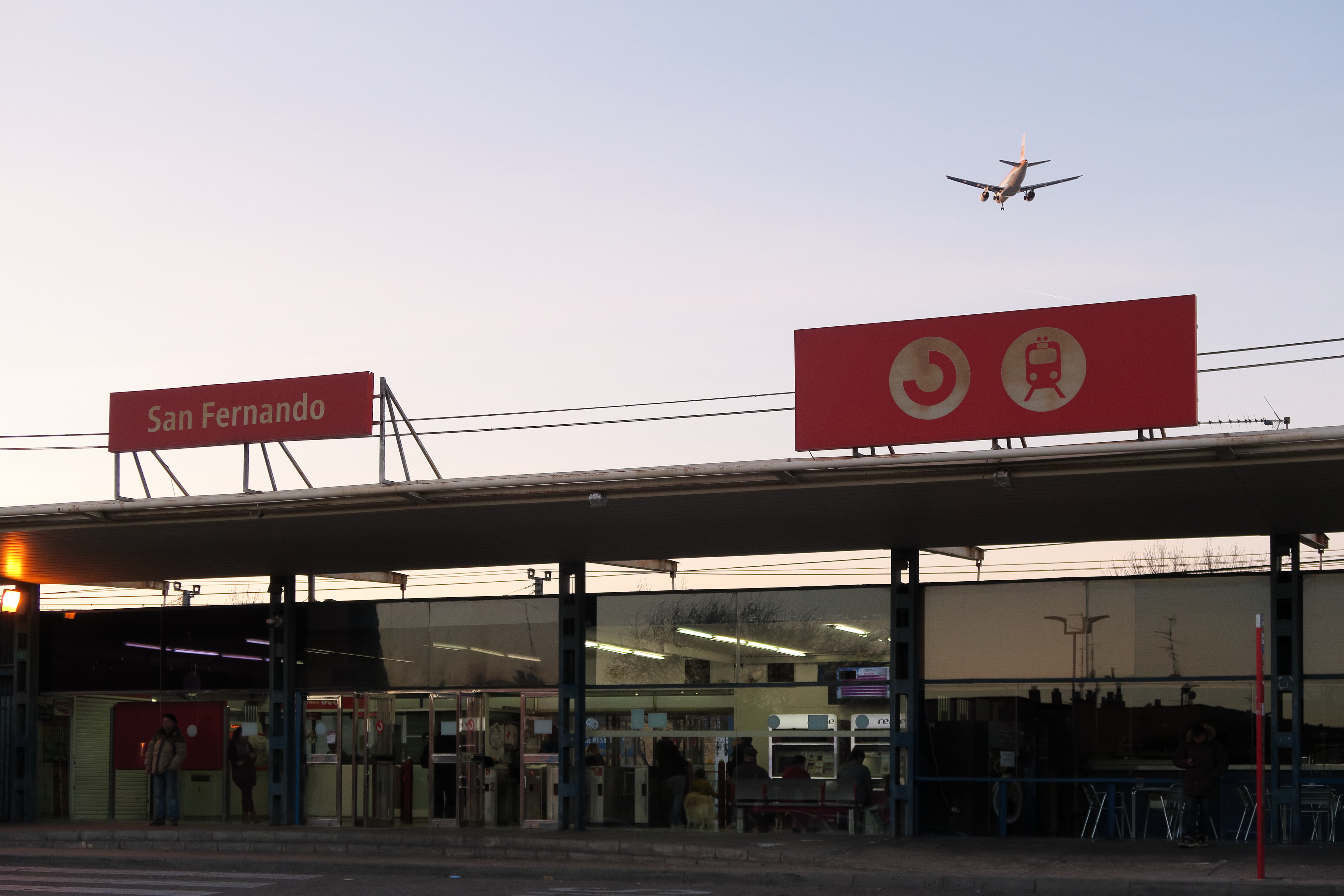 Estación de San Fernando (Cercanías Madrid)